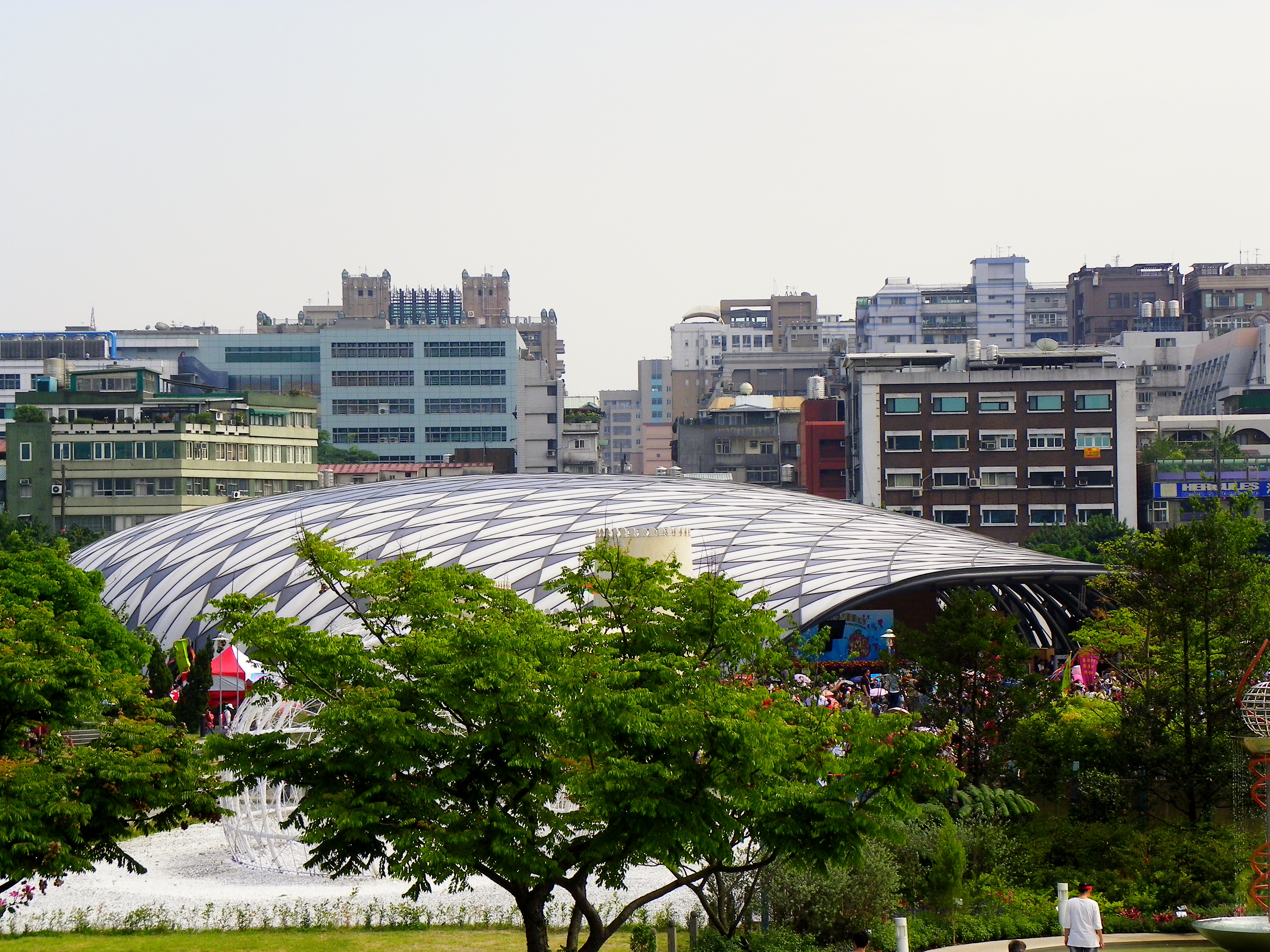 由北向南俯望臺北國際花博舞蝶館。